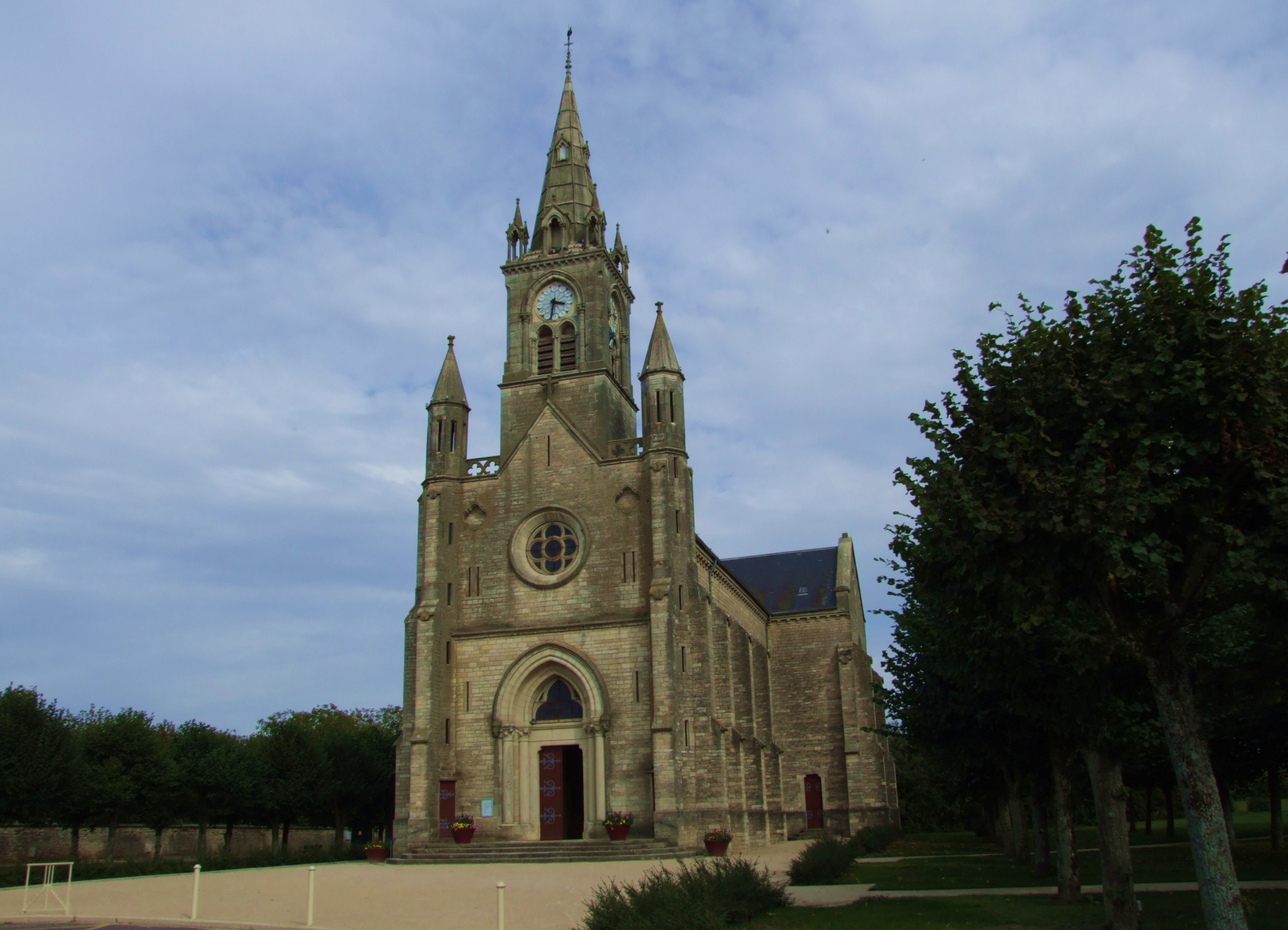 Église Saint-Laurent de Beire-le-Châtel, Beire-le-Châtel, Côte-d'Or, Bourgogne, FRANCE